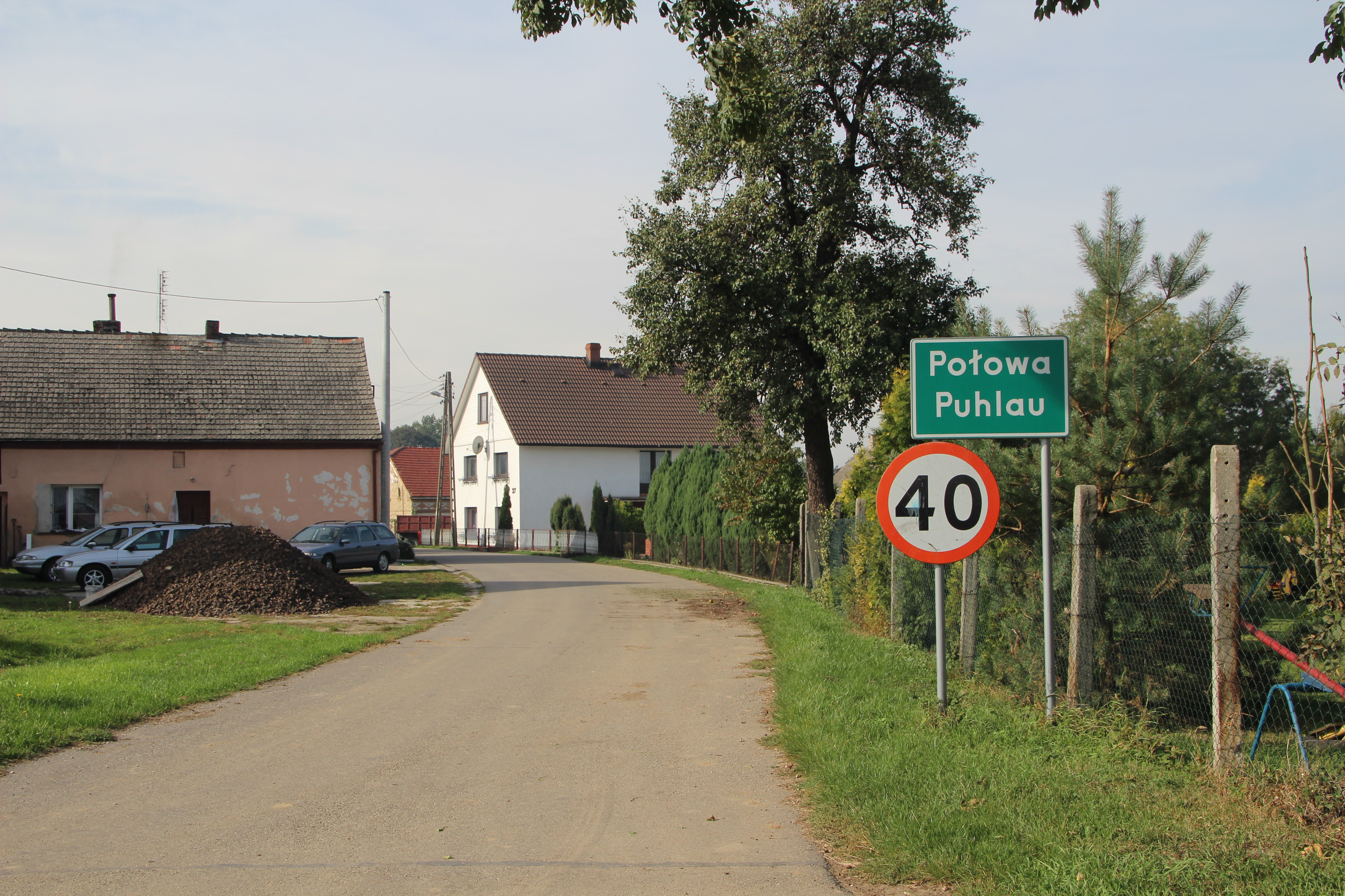 Połowa (w j. niem. Puhlau) – wieś w Polsce położona w województwie opolskim, w powiecie kędzierzyńsko-kozielskim, w gminie Polska Cerekiew.